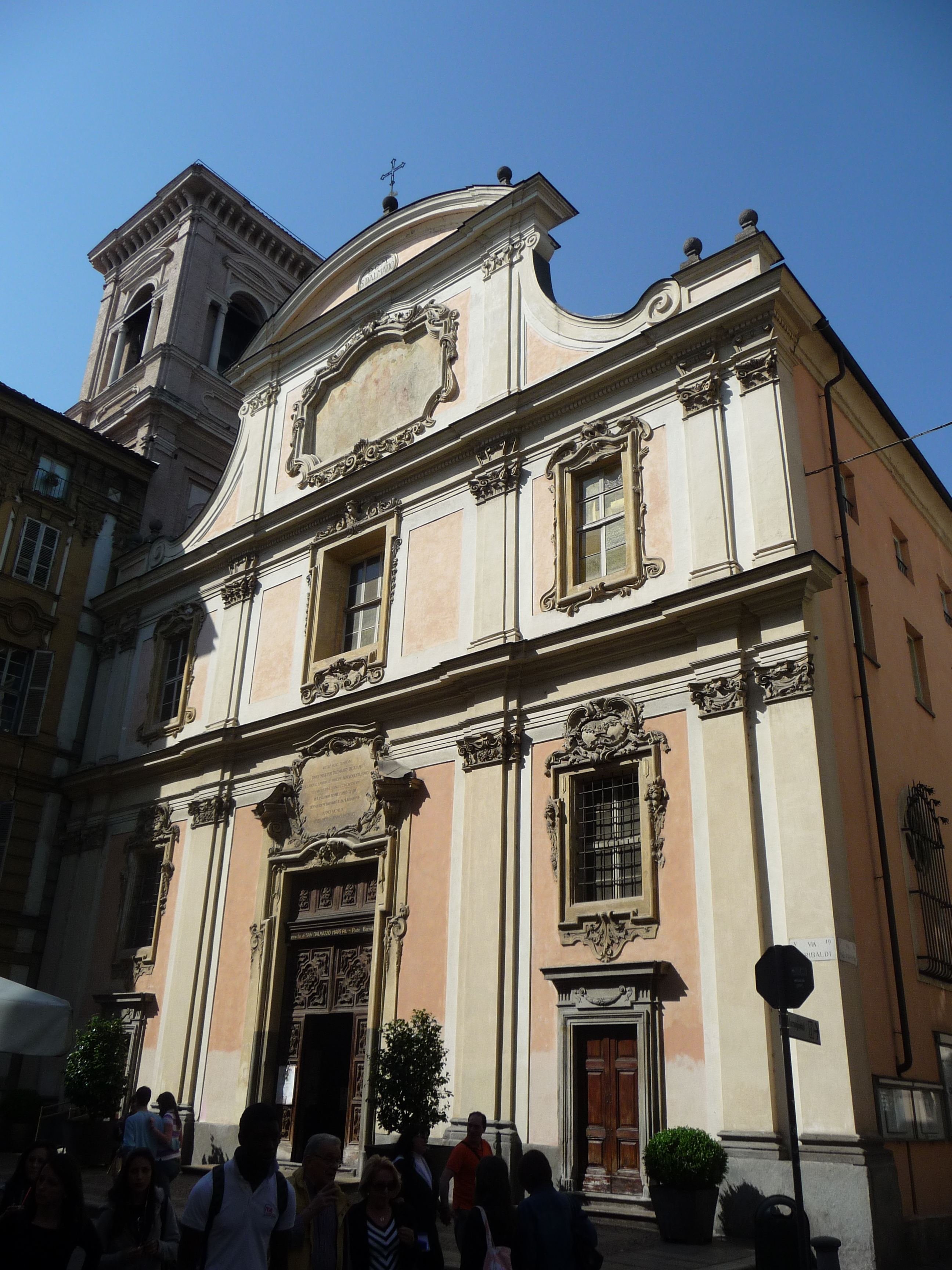 Facciata della chiesa di san Dalmazzo a Torino, in via Garibaldi.